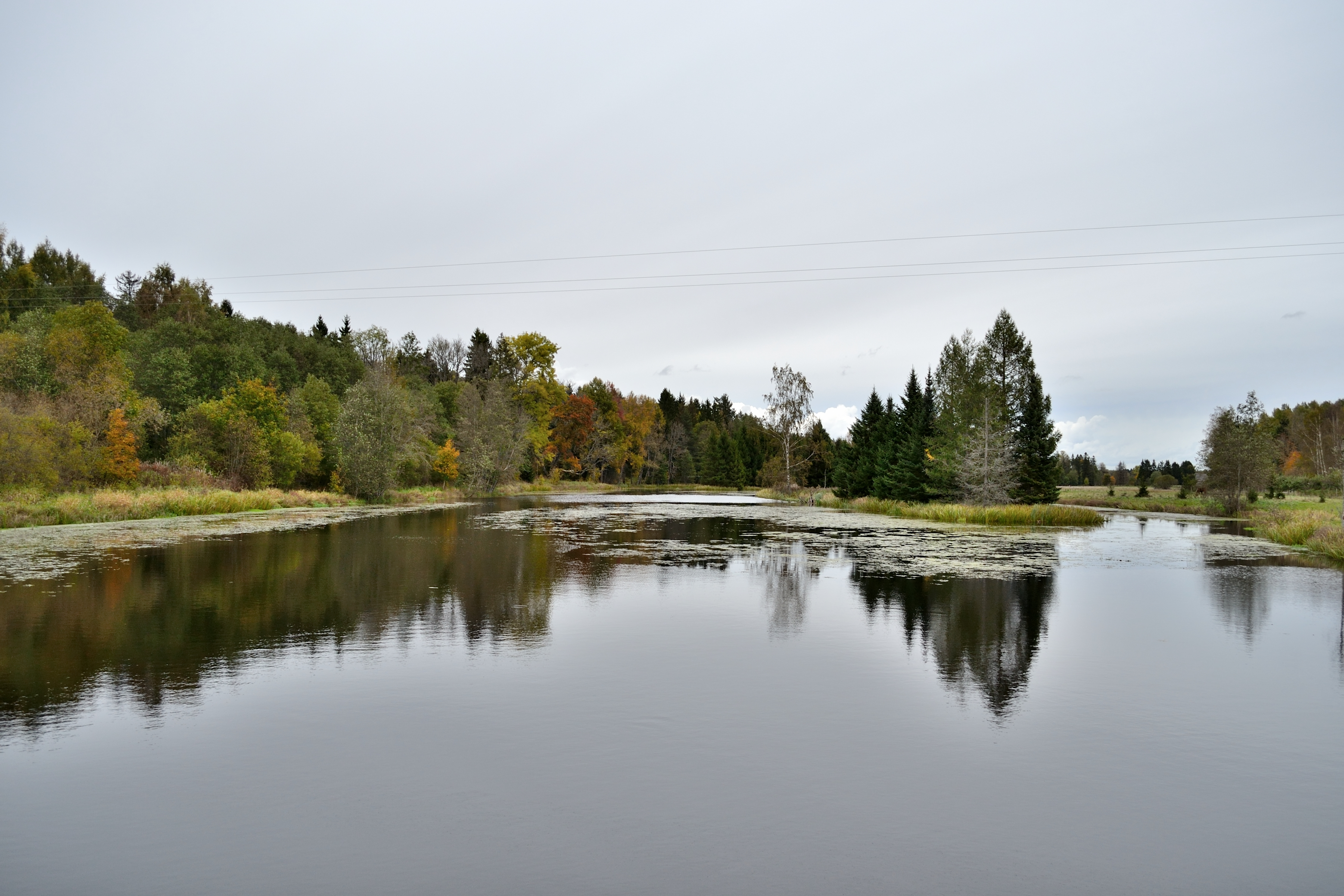 Vigala jõgi Kuusiku mõisa veskitammi ees